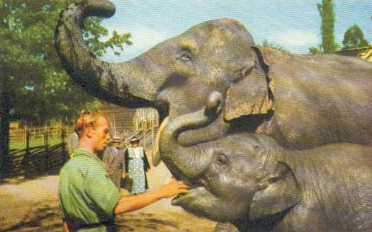 Elefanterna Lunkentuss och Bambina, med skötare Tore Glemmefors, Skansen 1939-1941.